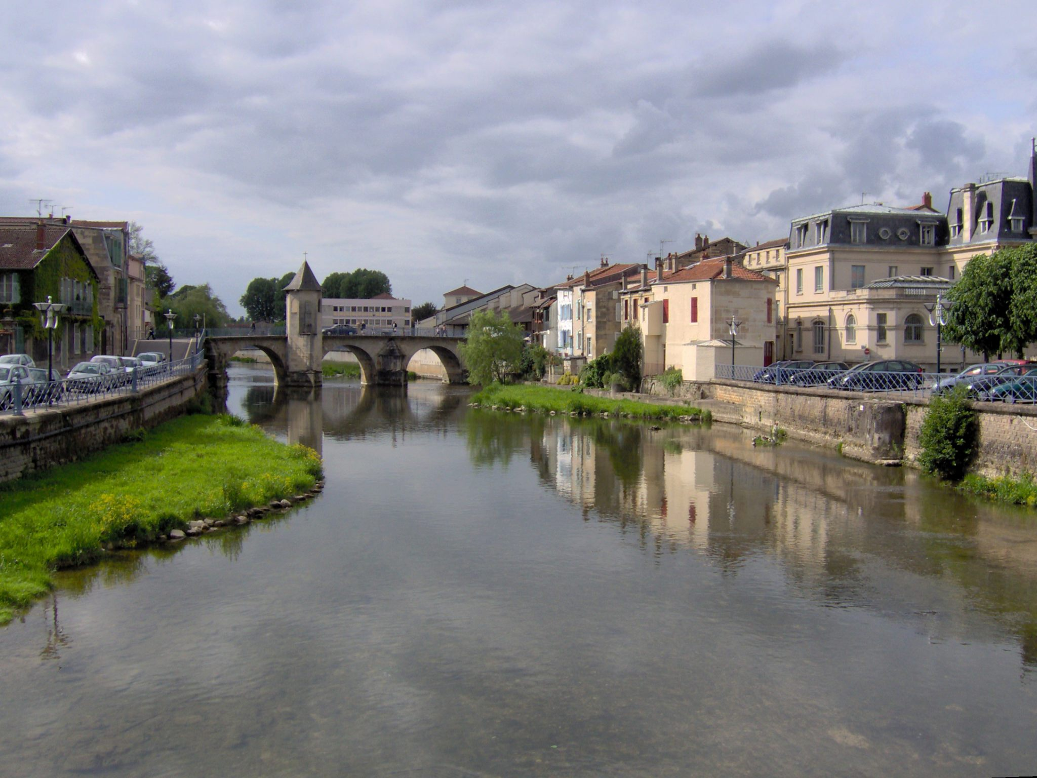 photo de l'Ornain (rivière) à Bar-le-Duc (Meuse, France), vue sur le POnt Notre-Dame / Picture of Ornain (river) in Bar-le-Duc (France), vue of the NOtre-Dame bridge